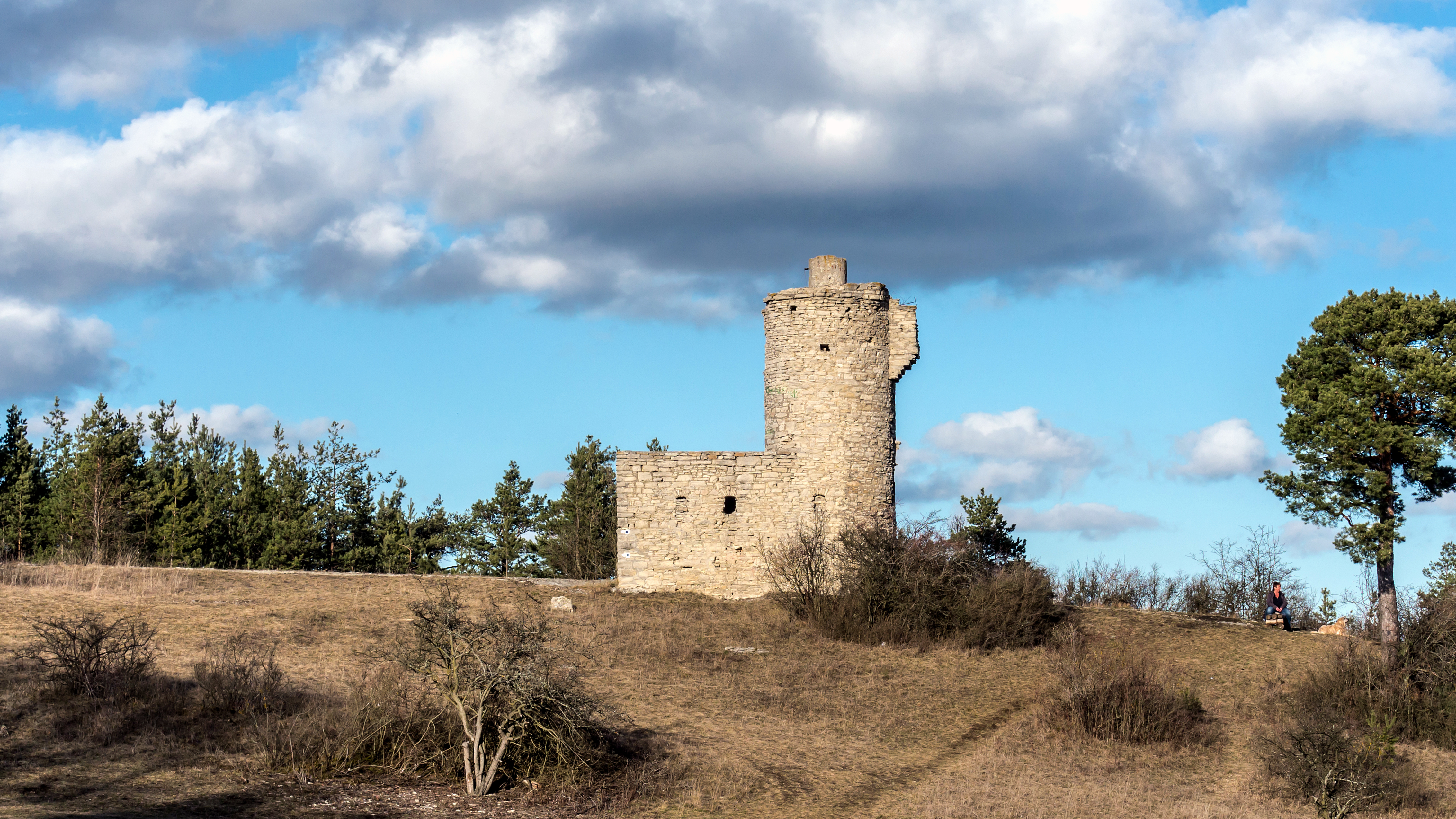 Zeigerheimer Berg